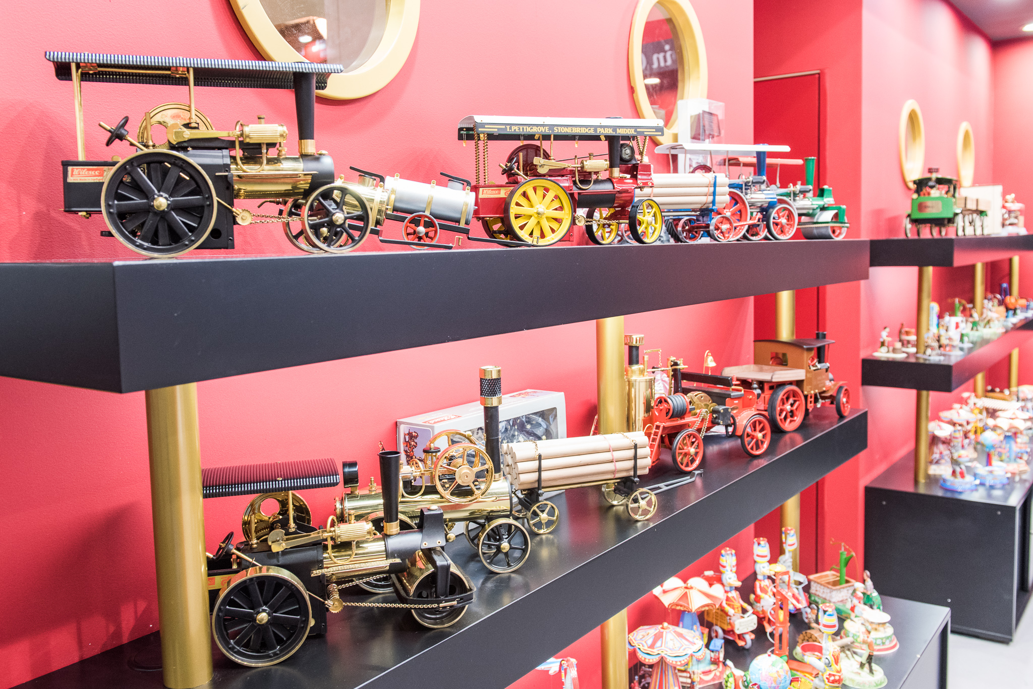 International Toy Fair Nürnberg,Messestand,Modelldampfmaschine,Spielwarenmesse,Wilesco,Wilhelm Schröder GmbH & Co. KG Metallwarenfabrik